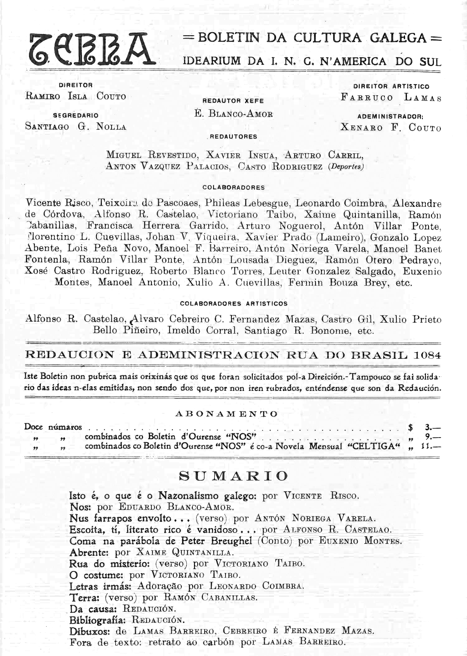 Integrantes da revista, colaboradores e sumario.